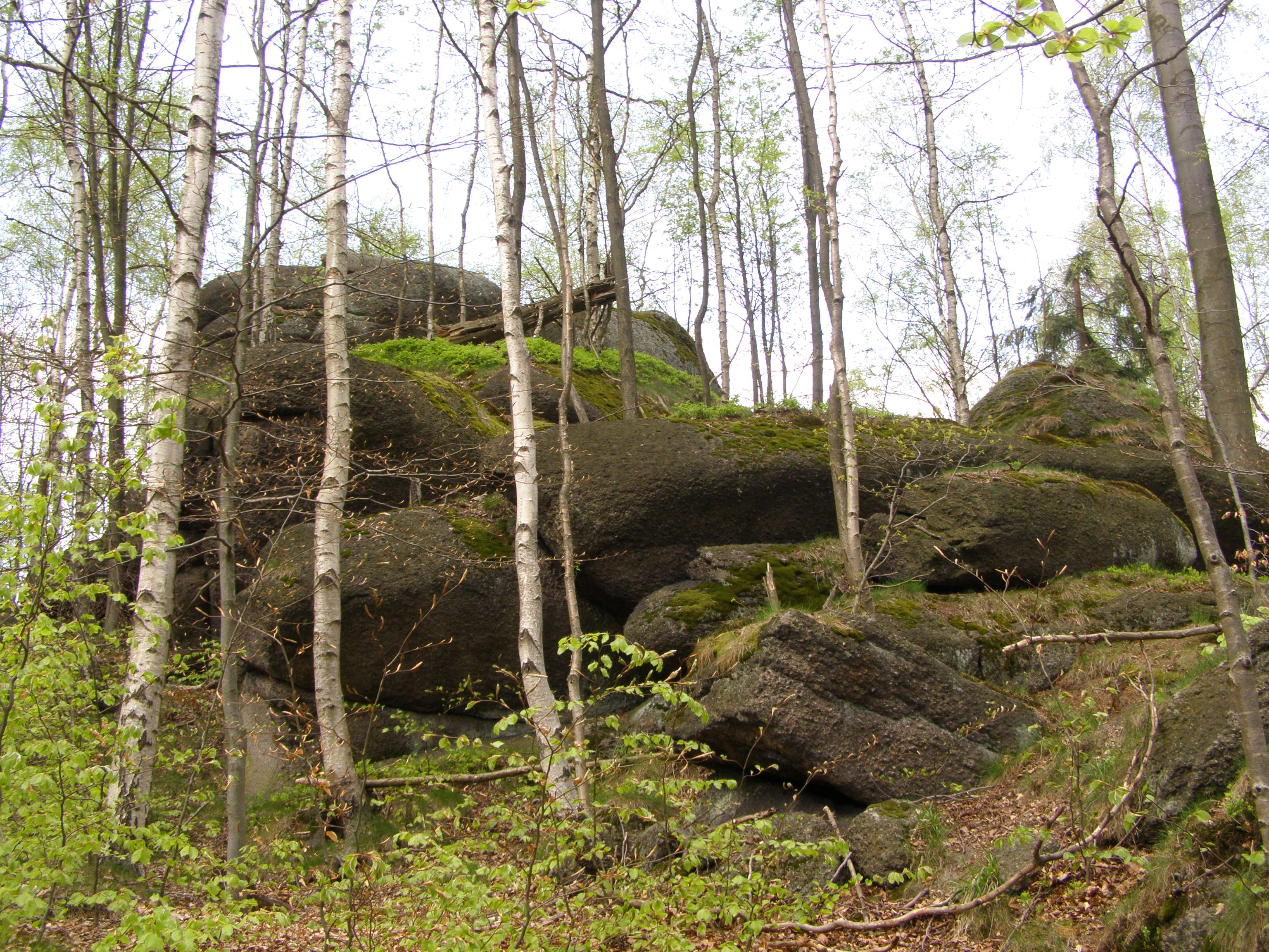 Oldřichovská vrchovina, NPR Jizerskohorské bučiny, skály na severovýchodním úbočí vrcholu Špičák (724 m)